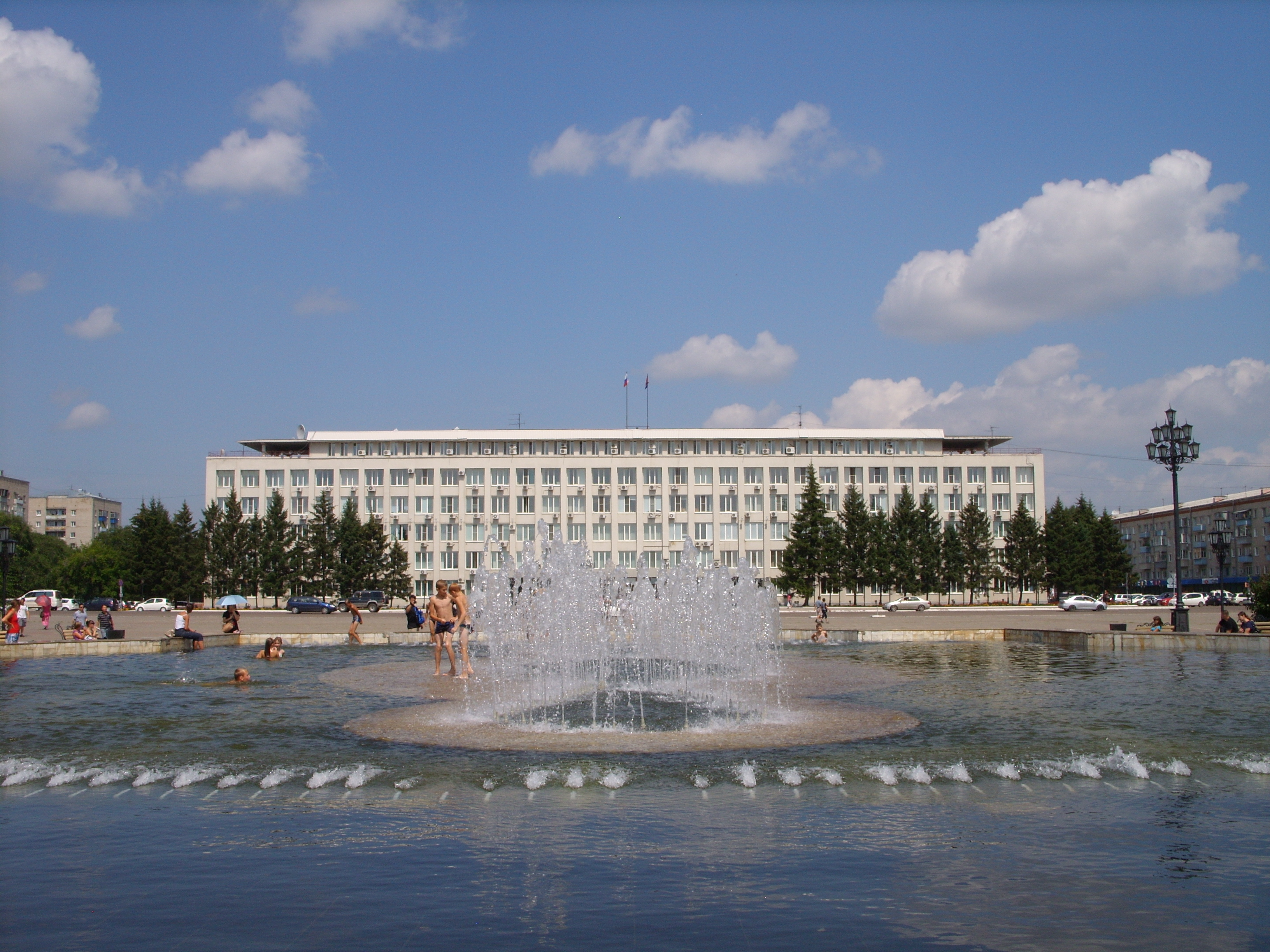 Амурская область, Россия. Снимки августа 2011 г.